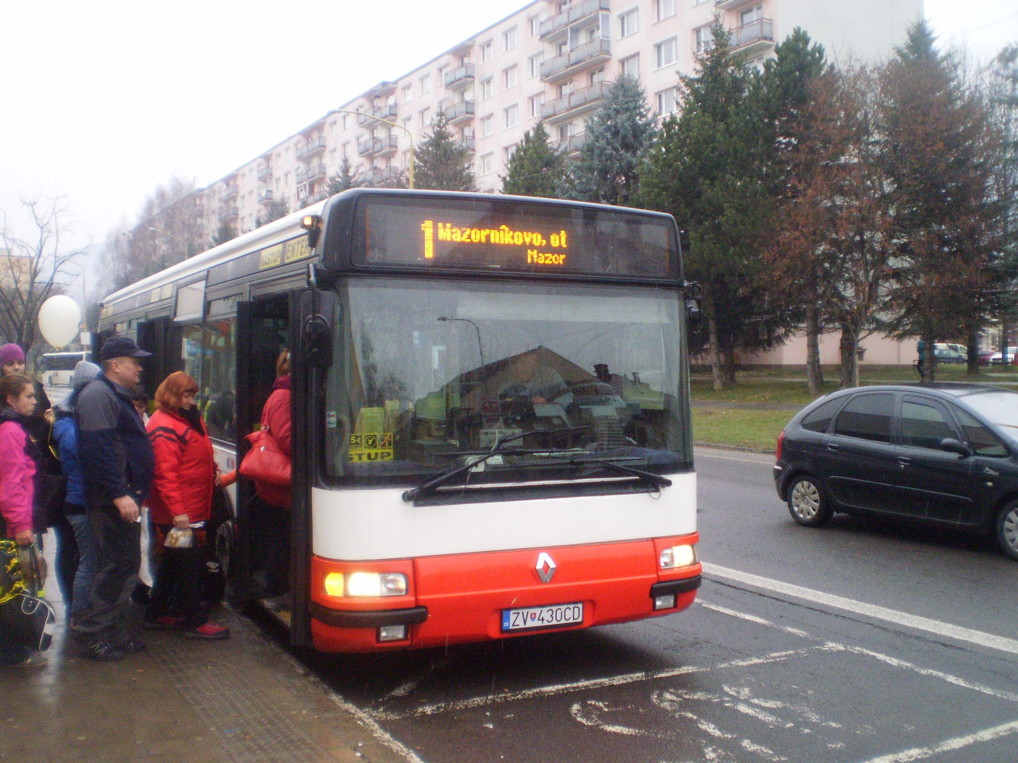 MHD Brezno na ulici ČSA